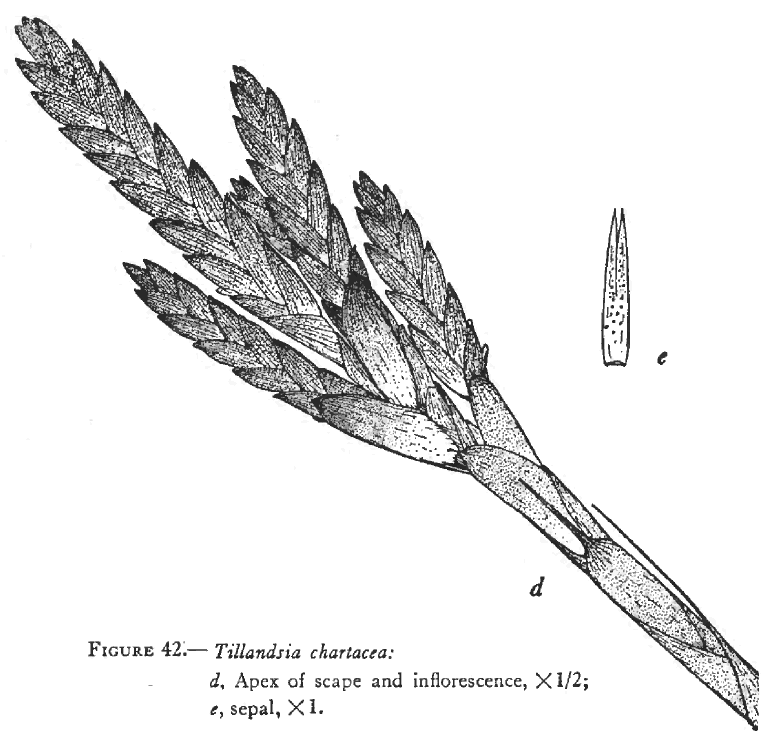 Illustration du protologue de Tillandsia chartacea L.B.Sm. (réorganisée)